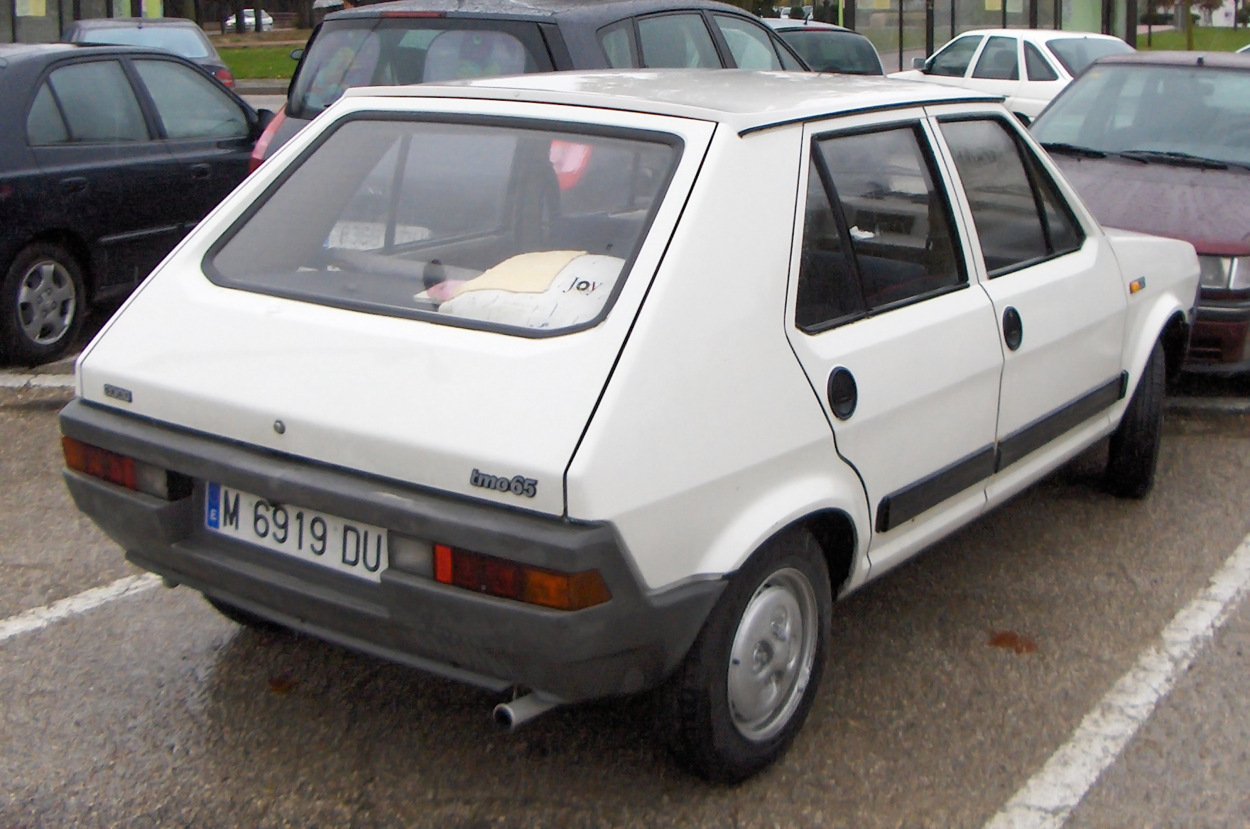 Seat Ritmo versión L, escasa difusión, aparcado en la calle.